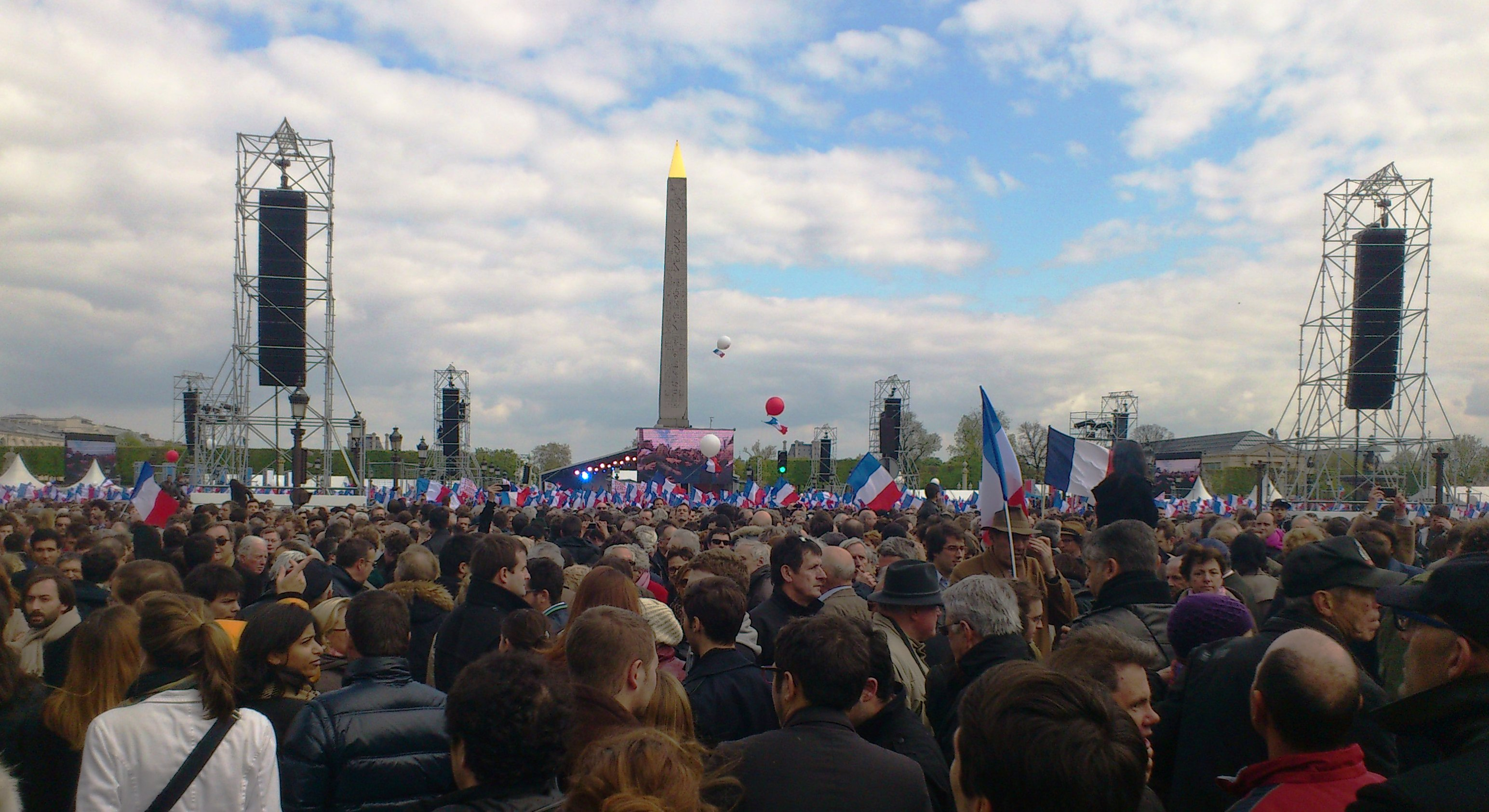 Une semaine avant le premier tour de la présidentielle, le 15 avril 2012, Nicolas Sarkozy a tenu un meeting en plein air sur la place de la Concorde, là même où il avait célébré sa victoire en 2007.